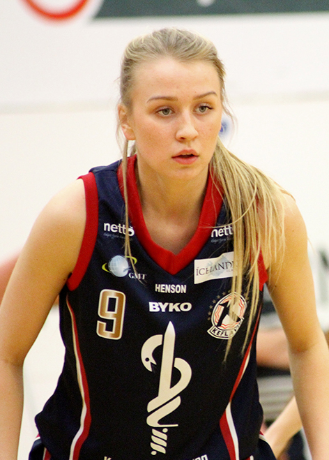 Keflavík's Hallveig Jónsdóttir in a game against Grindavík on 14 December 2014.